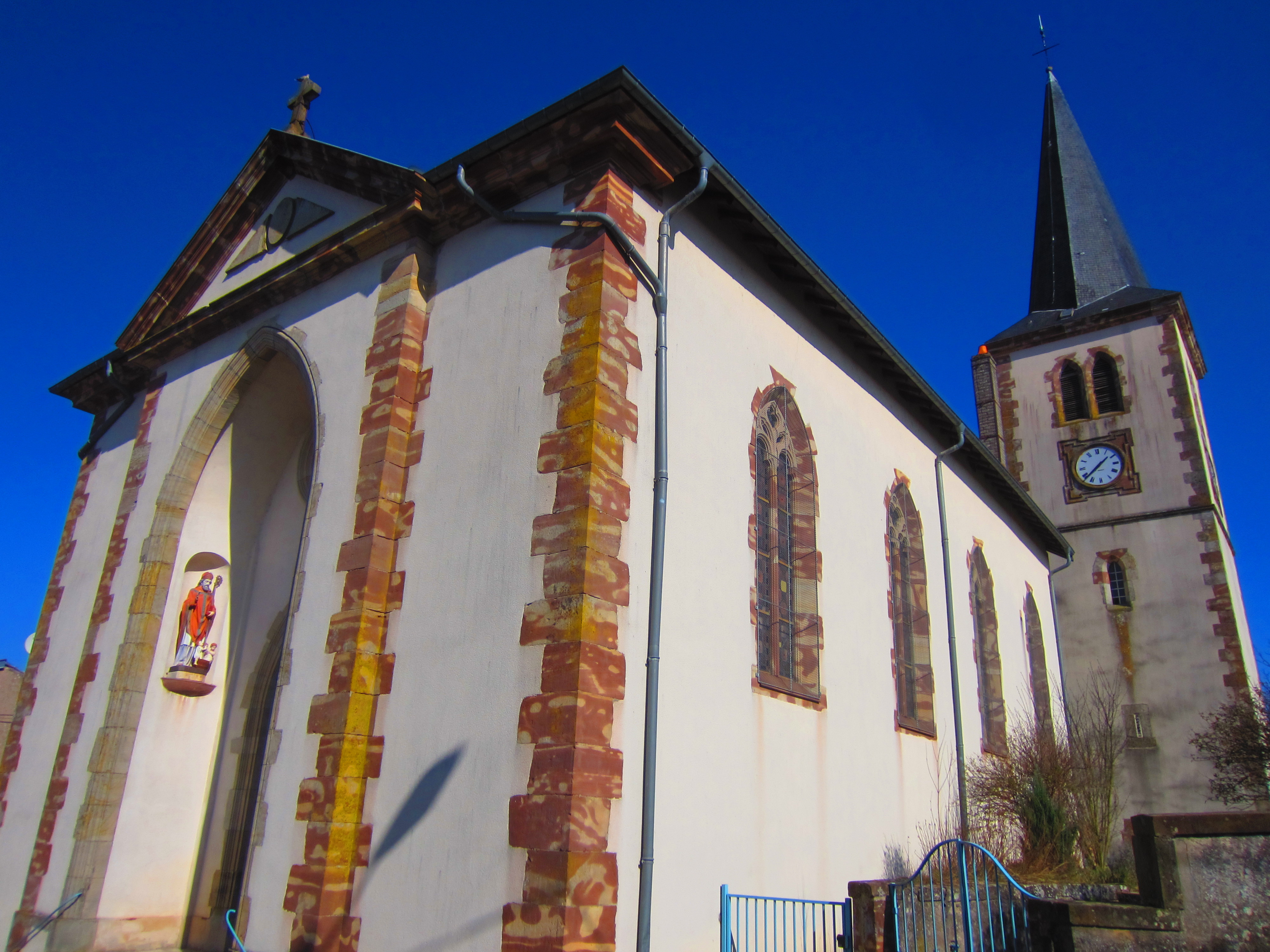 Mont Meurthe eglise